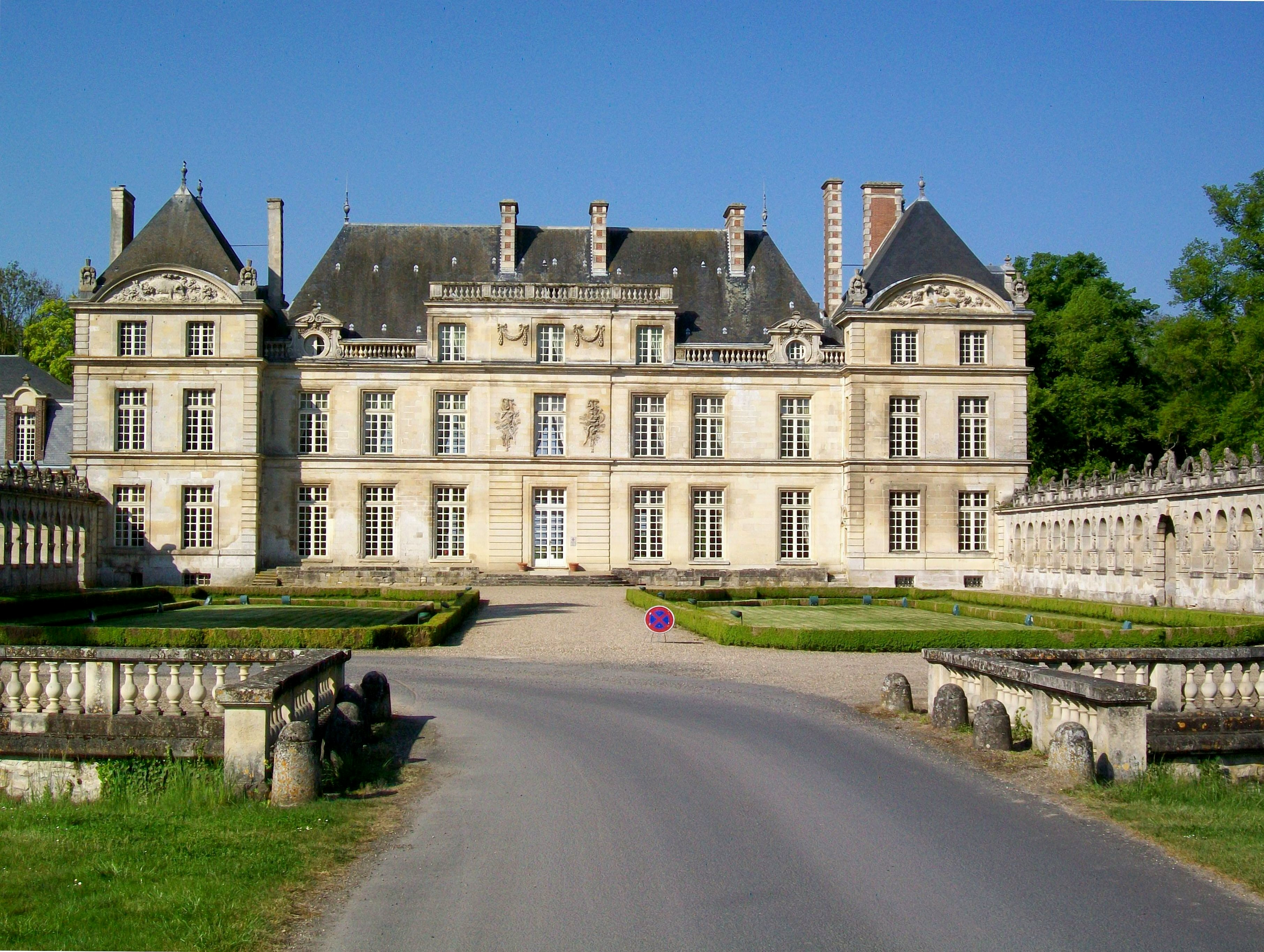 Le château de Raray et ses balustrades, sur la cour d'honneur à l'est.